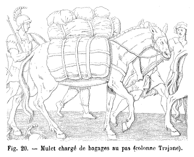 Les Moteurs Animés, Expériences de Physiologie Graphique (Conférence faite pendant la session de Paris de l’Association française pour l’avancement des sciences, le 29 août 1878) par Étienne-Jules Marey